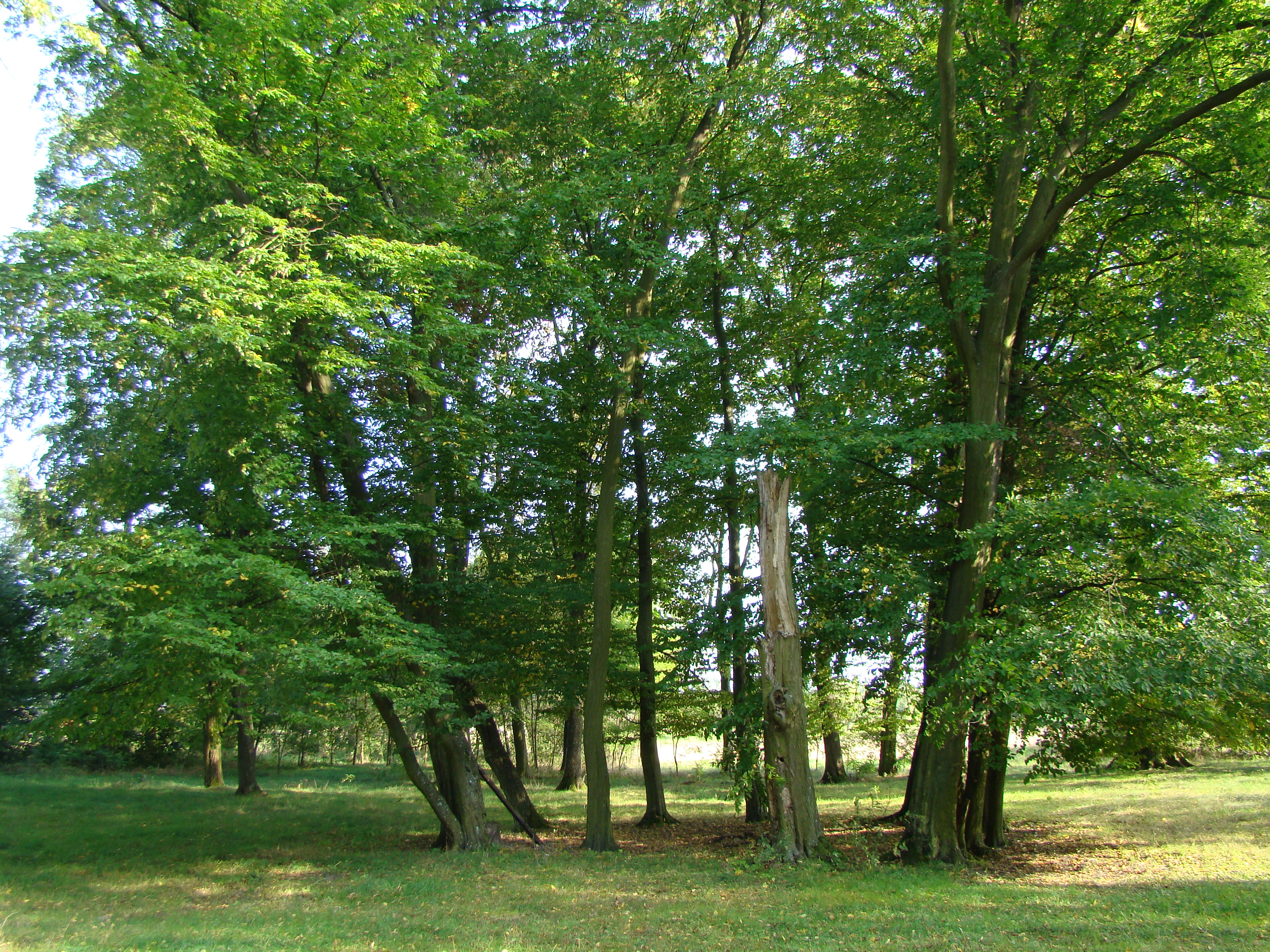 Park w Dobrenicach Wikidata has entry Q30092460 with data related to this item.